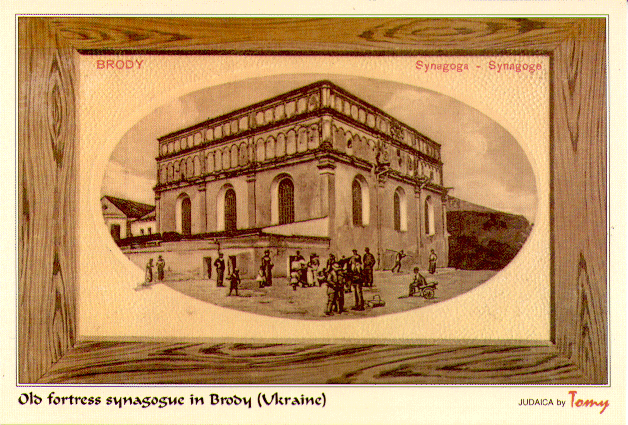 The Old fortress synagogue of Brody "Brody Kloiz", Lviv region of western Ukraine. Antique postcard. Стара єврейська синагога в місті Броди, Львівська область, Галичина, західна Україна. Старовинна листівка.